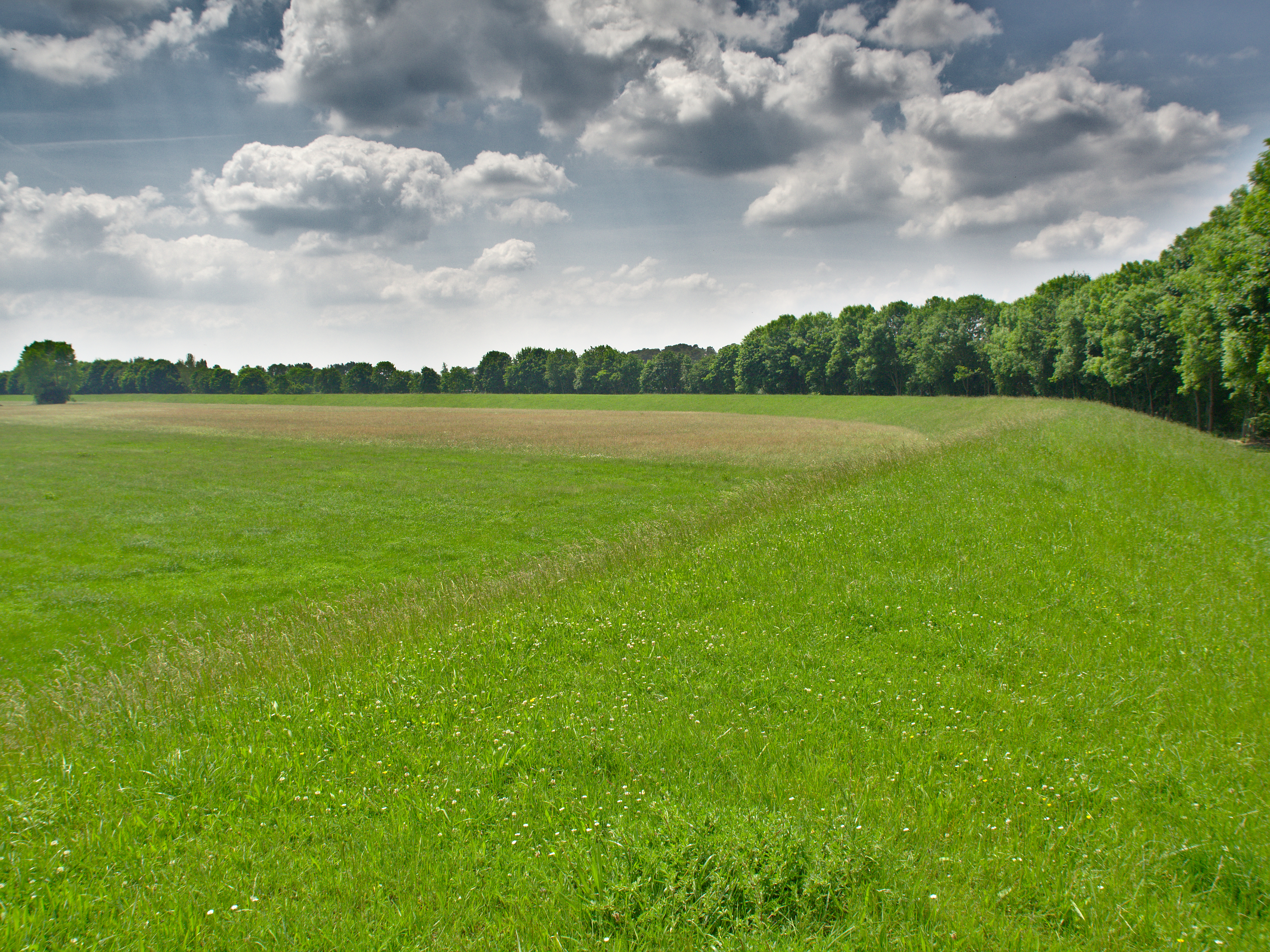 (NSG:HE-1431005)_Weschnitz-Insel von Lorsch